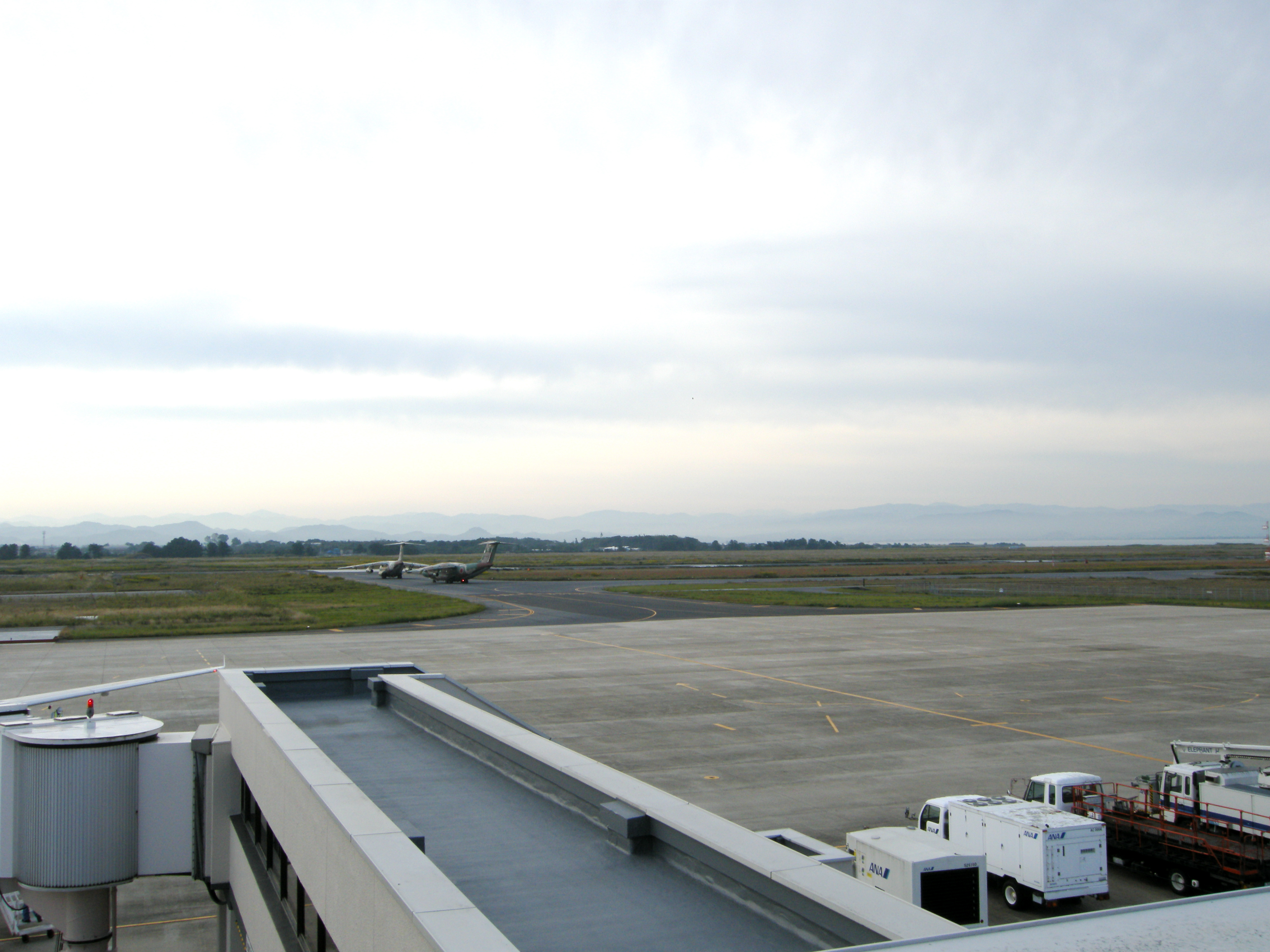 鳥取県にある美保飛行場滑走路の写真。